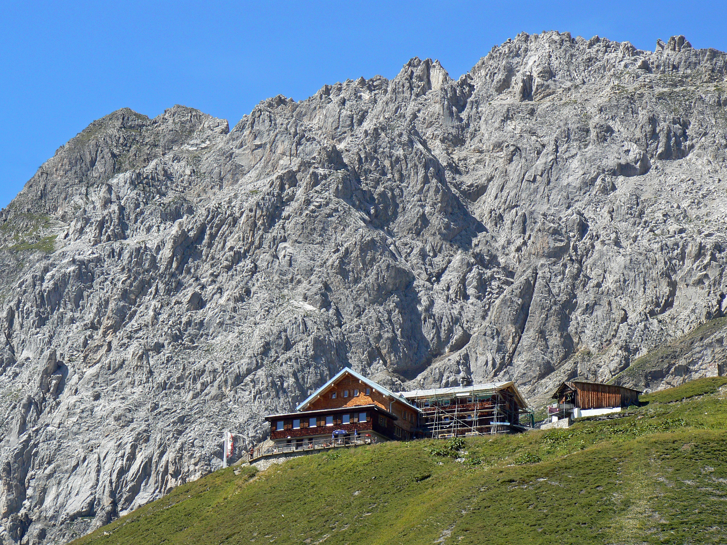 Ulmer Hütte vor Pazielfernerspitze